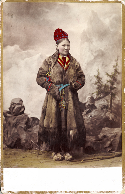 Ateljébild. En kvinna i samisk dräkt. Handkolorerad.